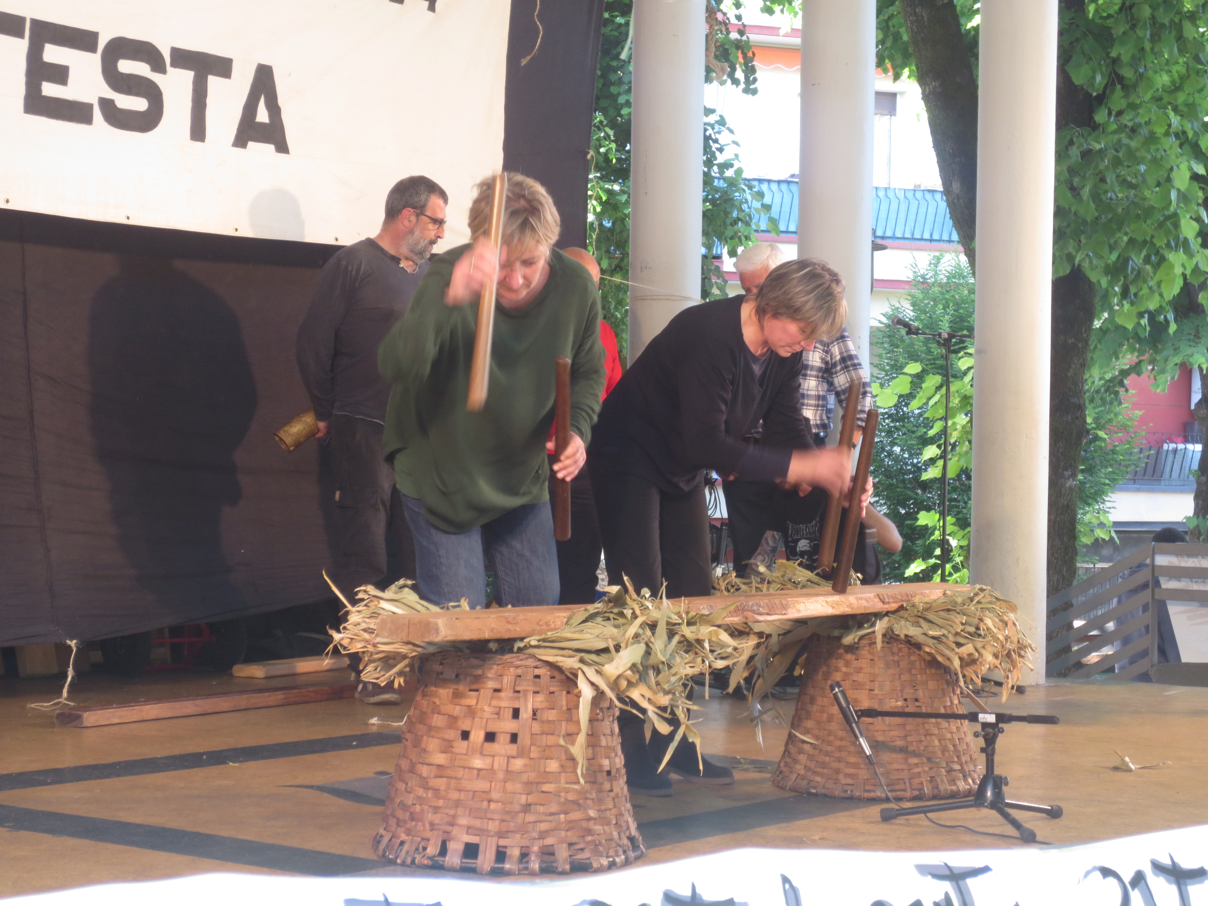 Txalaparata zaharra jotzen Hernaniko Txalaparta Festan, 2017